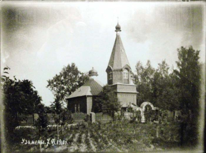 Беларуская (тарашкевіца): Узьмёны (Uźmiony). Мікалаеўская царква-мураўёўка